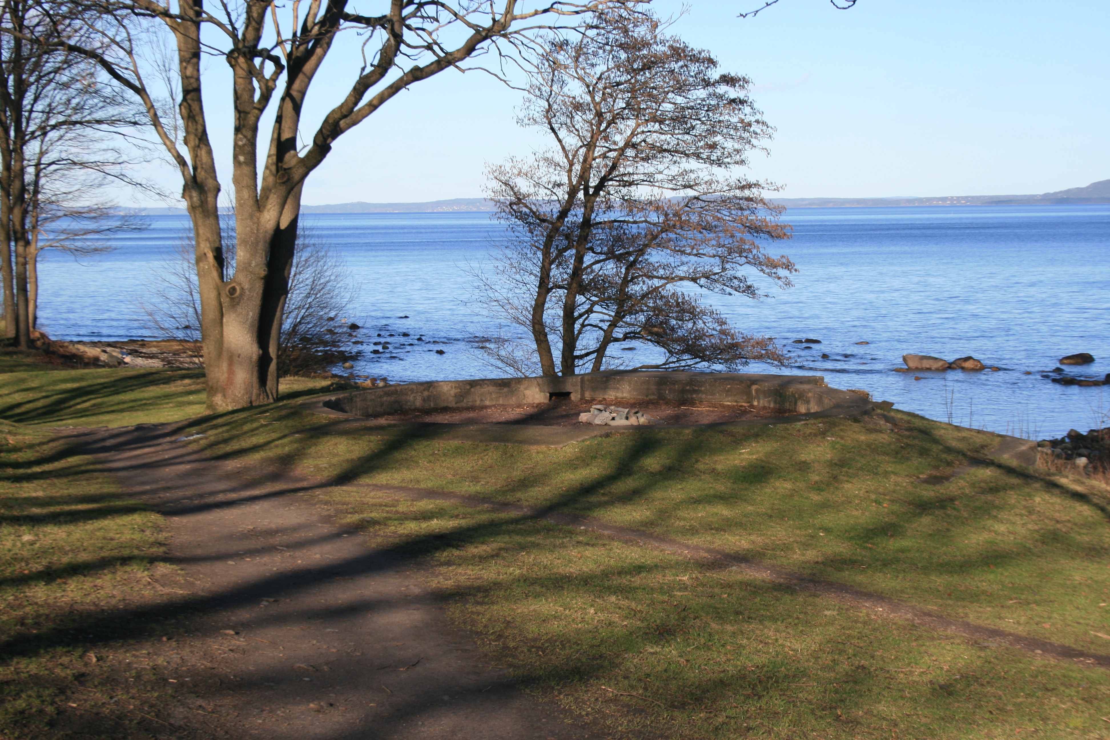 Det gamle alarmbatteriet. Sist brukt av tyskerne. Tjener i dag funksjonen som bålplass og benk.